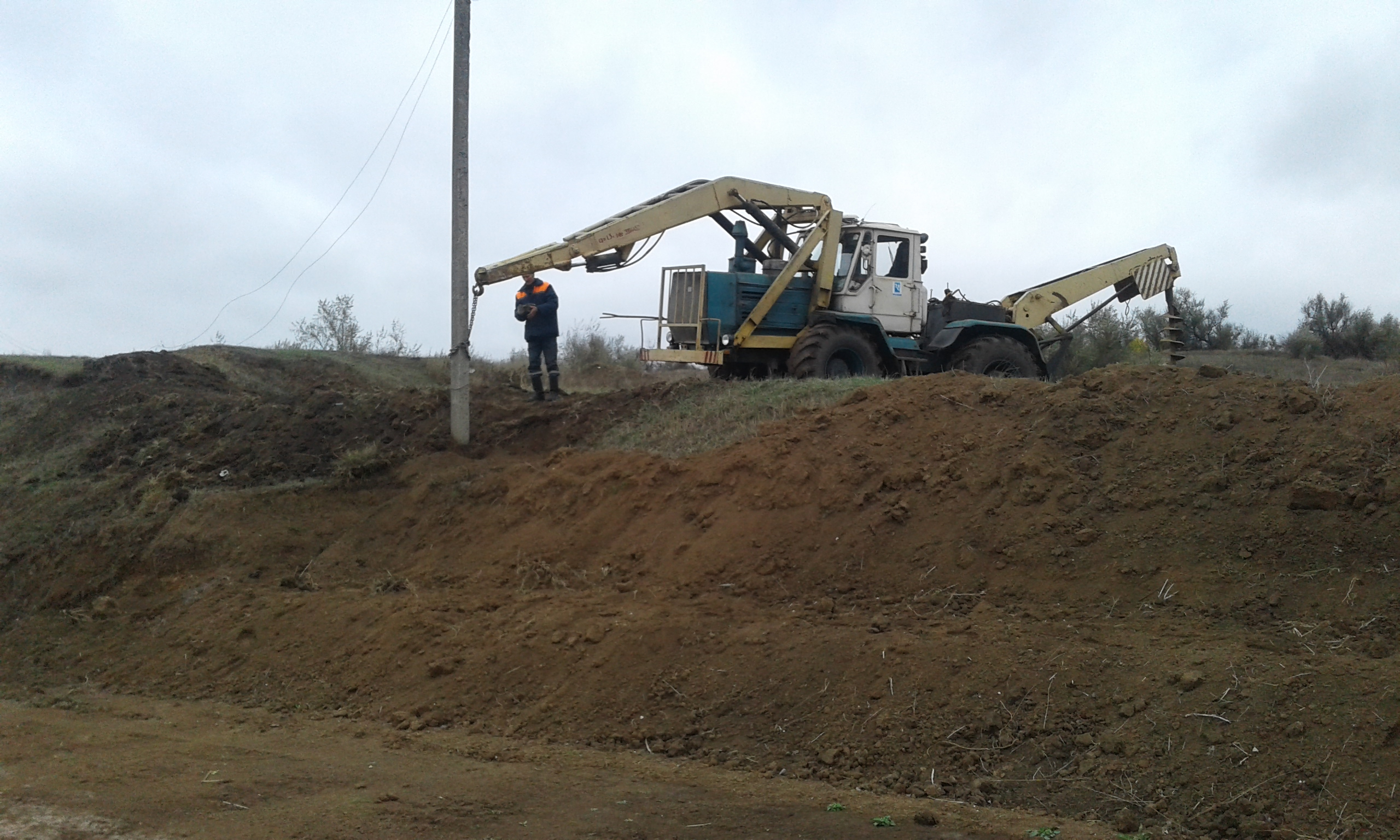 Установка опори лінії електропередачі